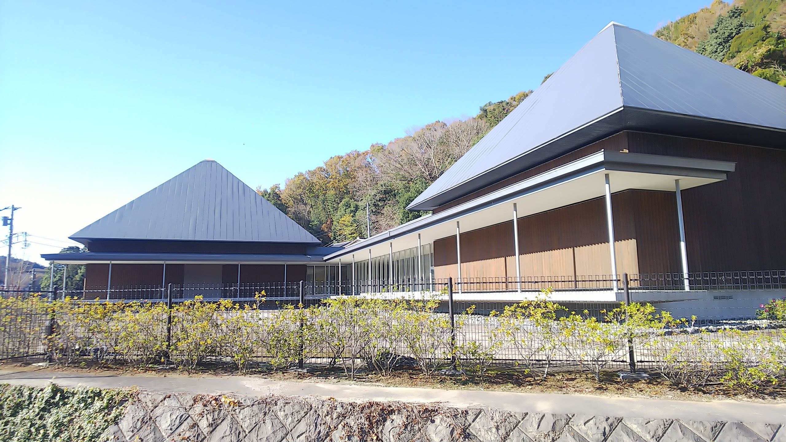 静岡県函南町にある「かんなみ仏の里美術館」を道路側からみた写真